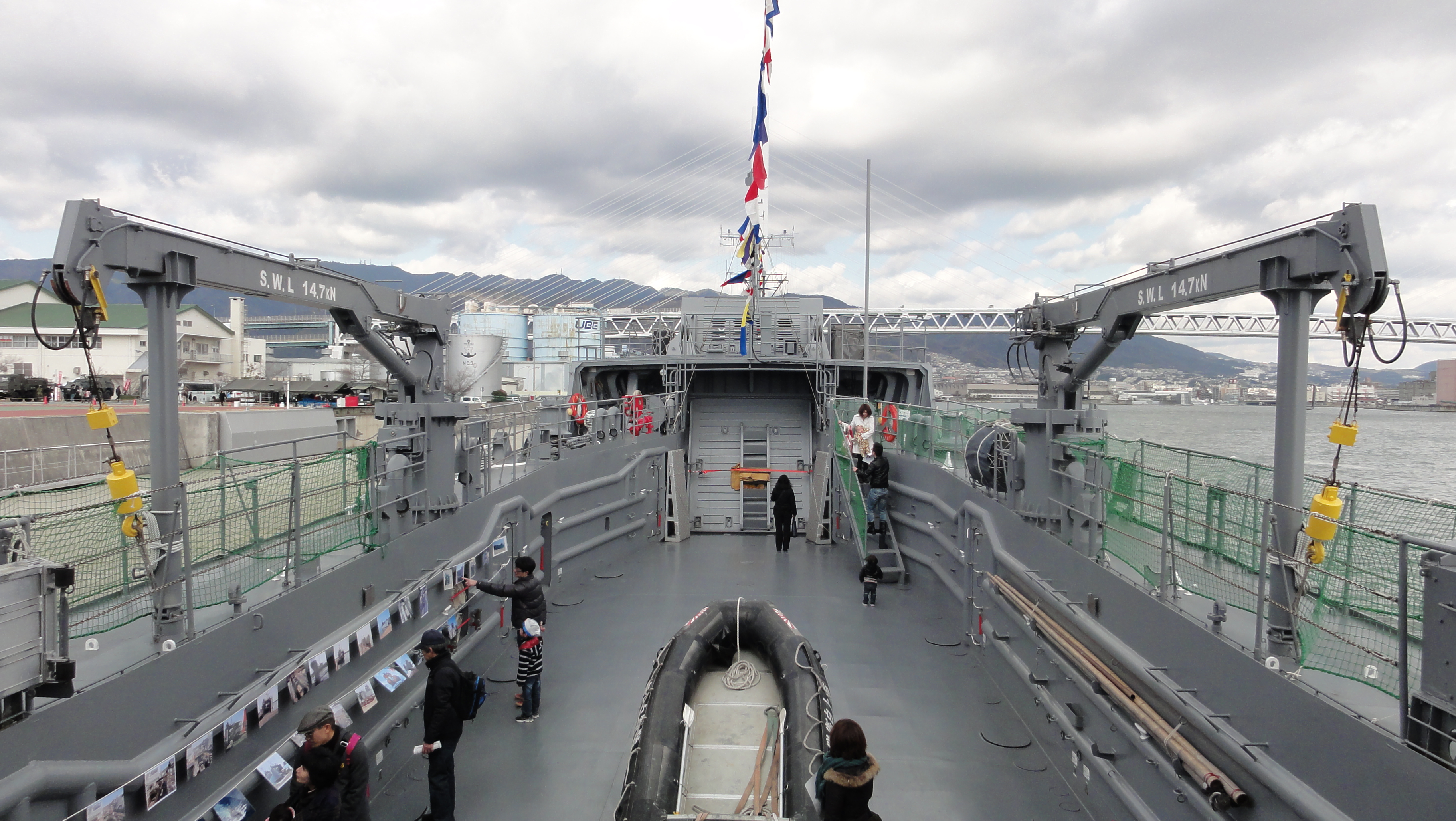 輸送艦ゆら（LSU-4171）の車両甲板 12年2月11日 海上自衛隊阪神基地にて